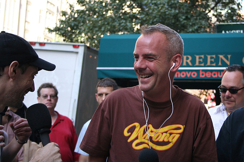 Fatboy Slim in 2006